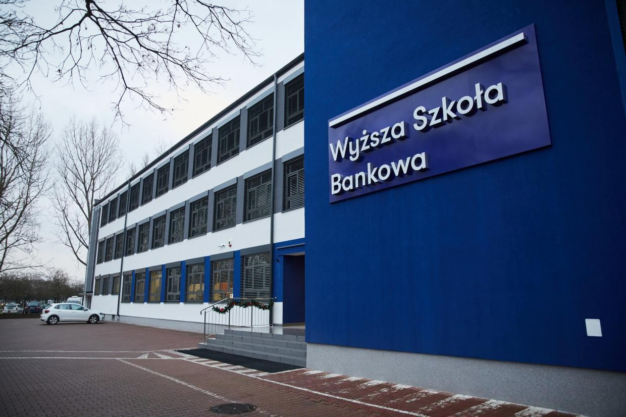 Budynek WSB w Warszawie